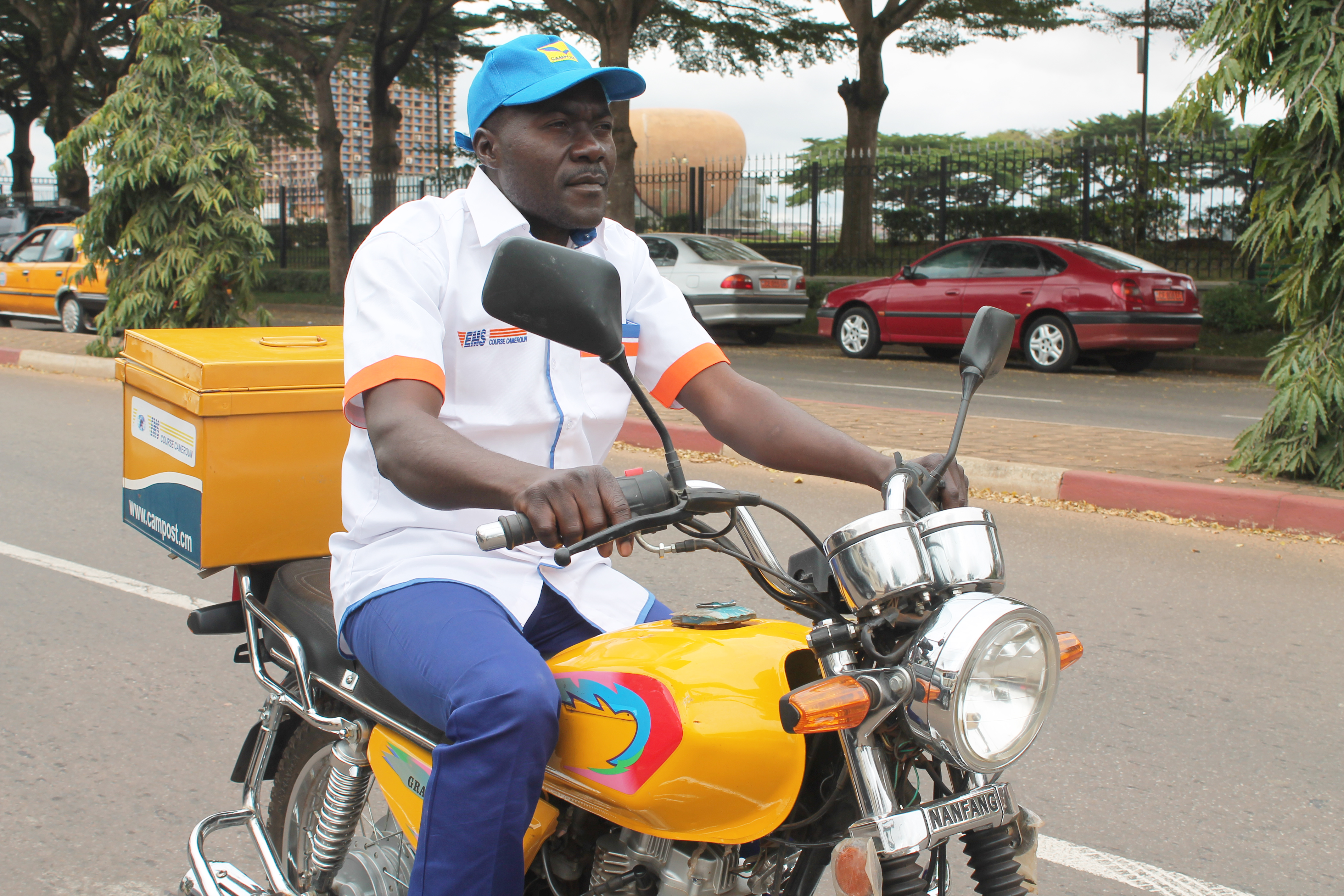 Agent EMS sur un emoto transportant du courrier